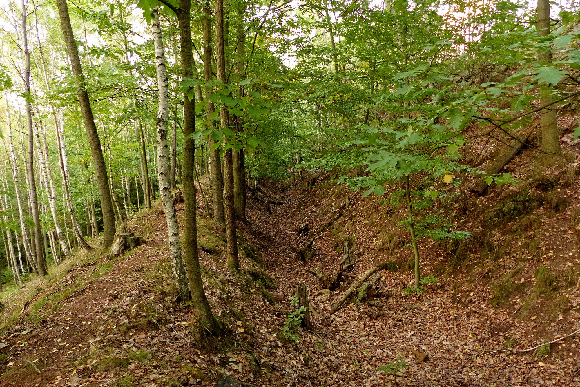 Příkop a val na Doubku.